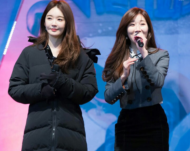 170114 비발디파크 라이딩 콘서트 - 다비치 직찍